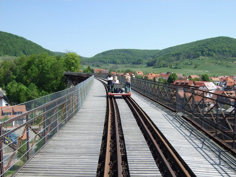 Draisine bei Lengenfeld am Stein (Berge: links Walperbiel, Mitte und rechts Ausläufer des Kälberberges)